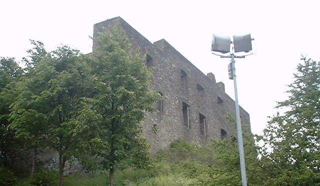 Beschreibung: Front der Burgruine bei Ulmen de:1999 Quelle: eigene Fotografie Fotograf: M. Budde